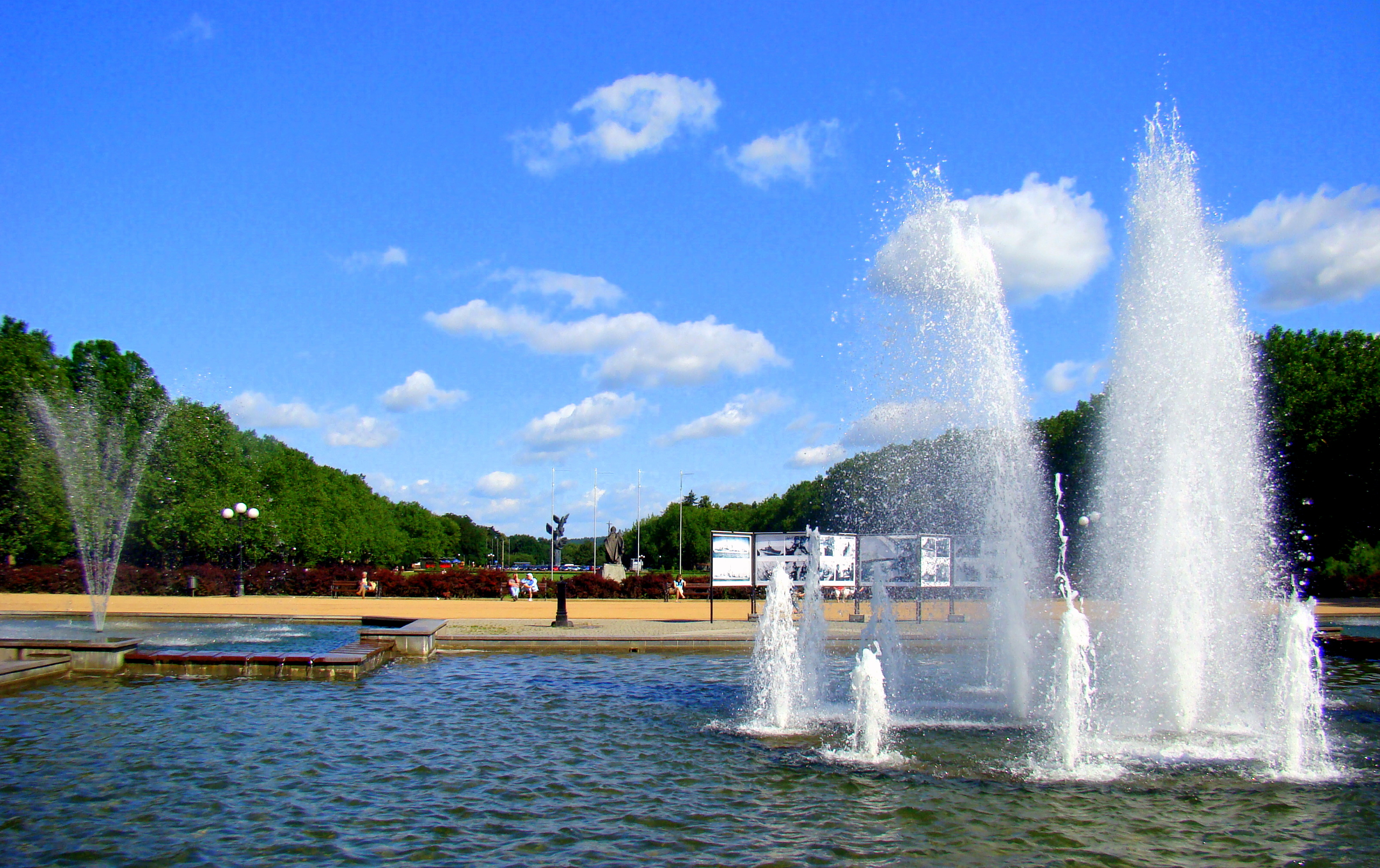 Plac Jasne Błonia im. Jana Pawła II, Szczecin, Polska